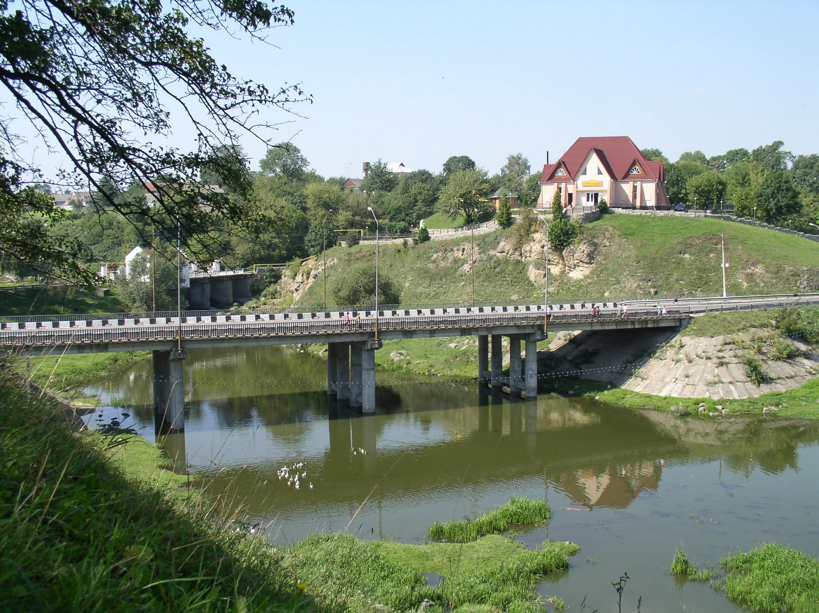 річка Тетерів